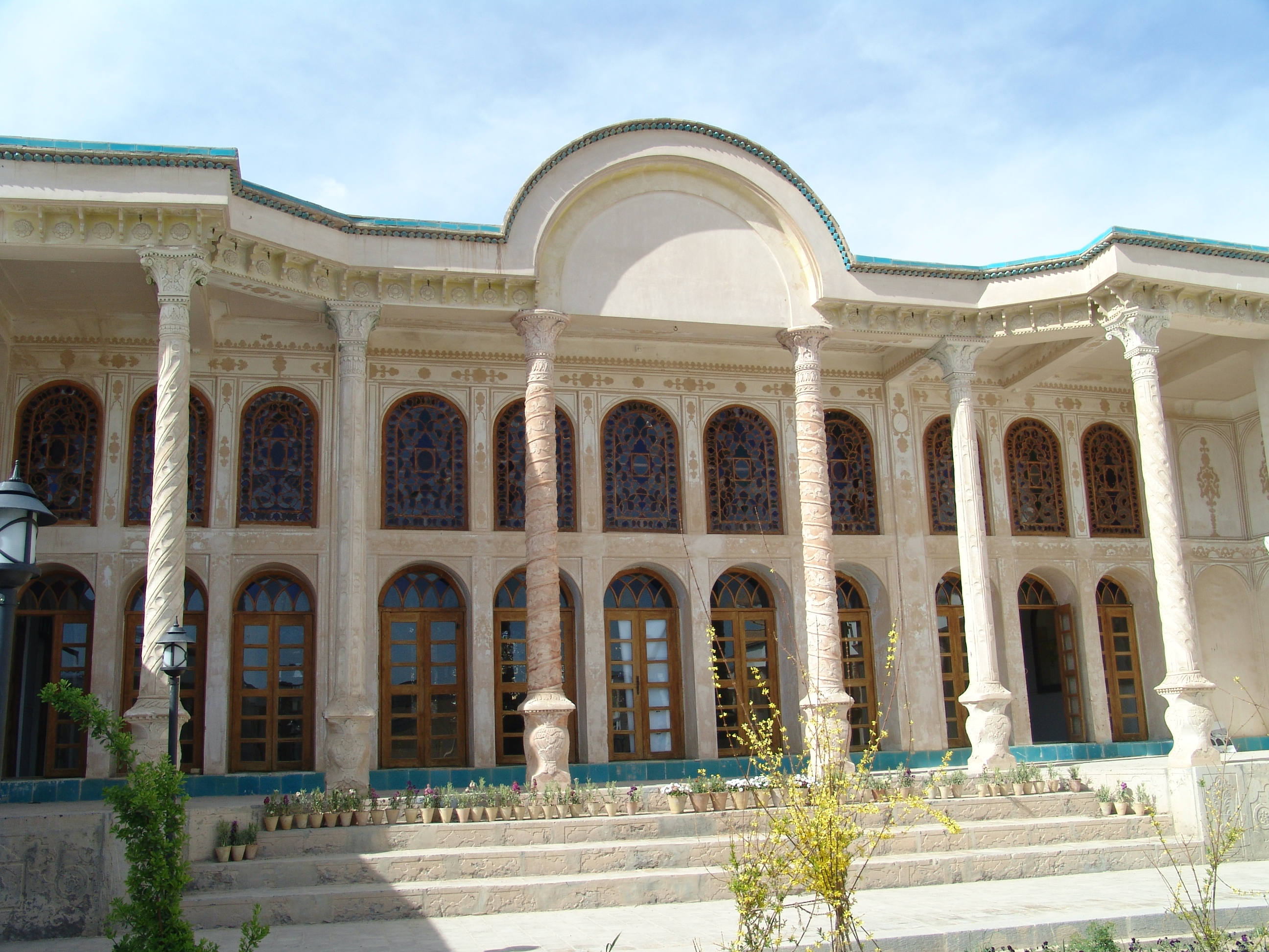 خانه سرتیب حاج محمدحسین خان امینی سده‌ای